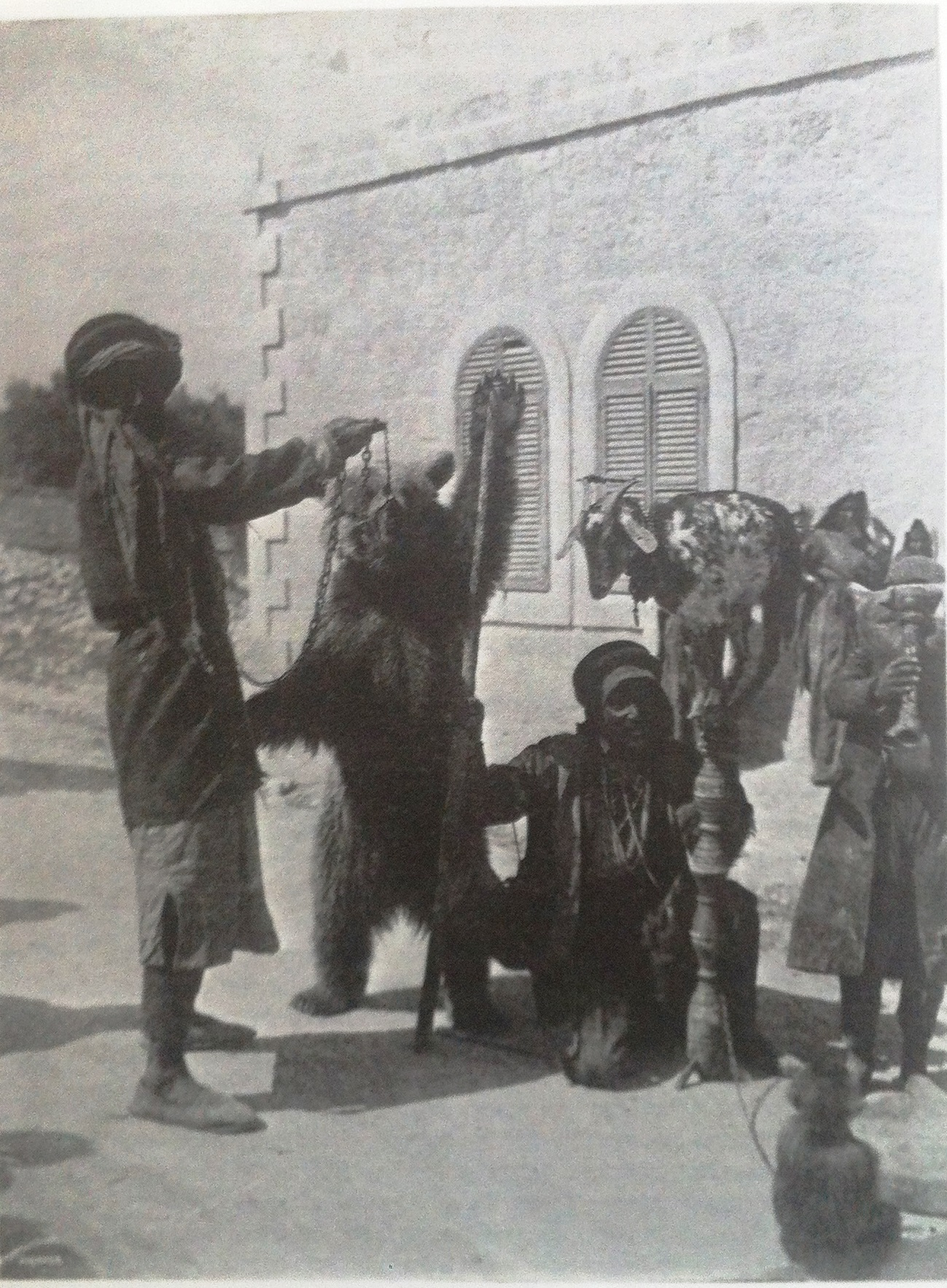 קרקס רחוב צועני בירושלים